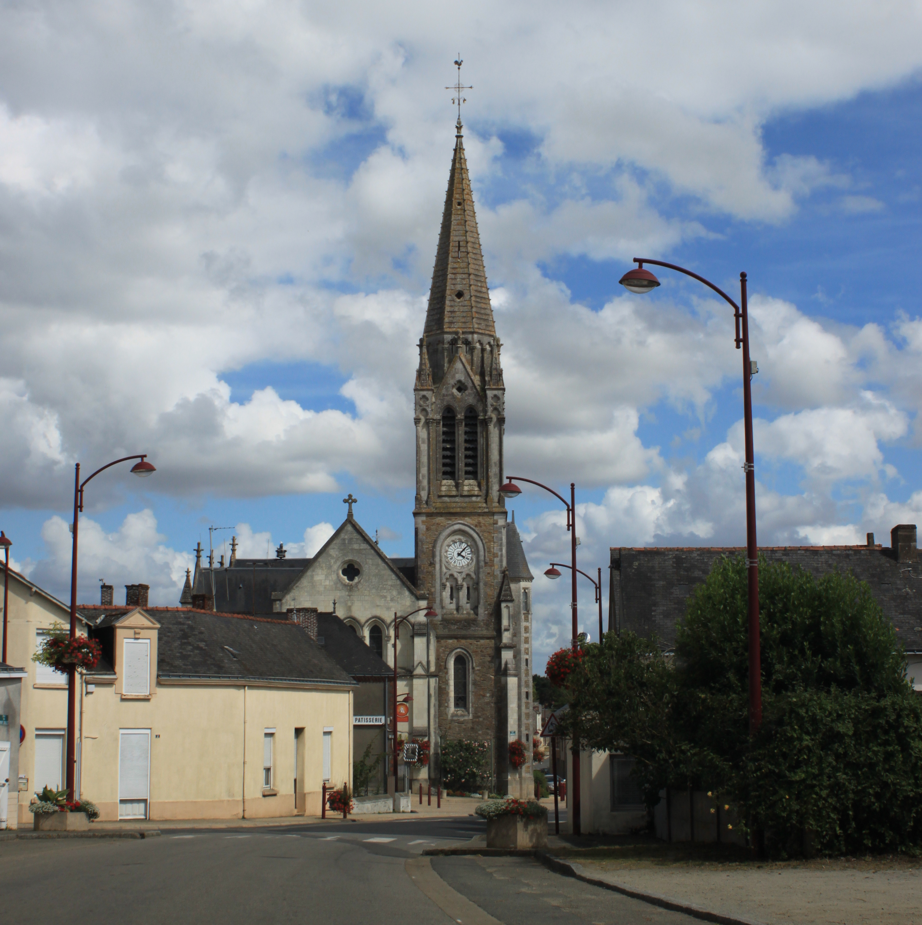 Église Sainte-Melaine, XVIII°-1849-1861-1895, Les Touches.